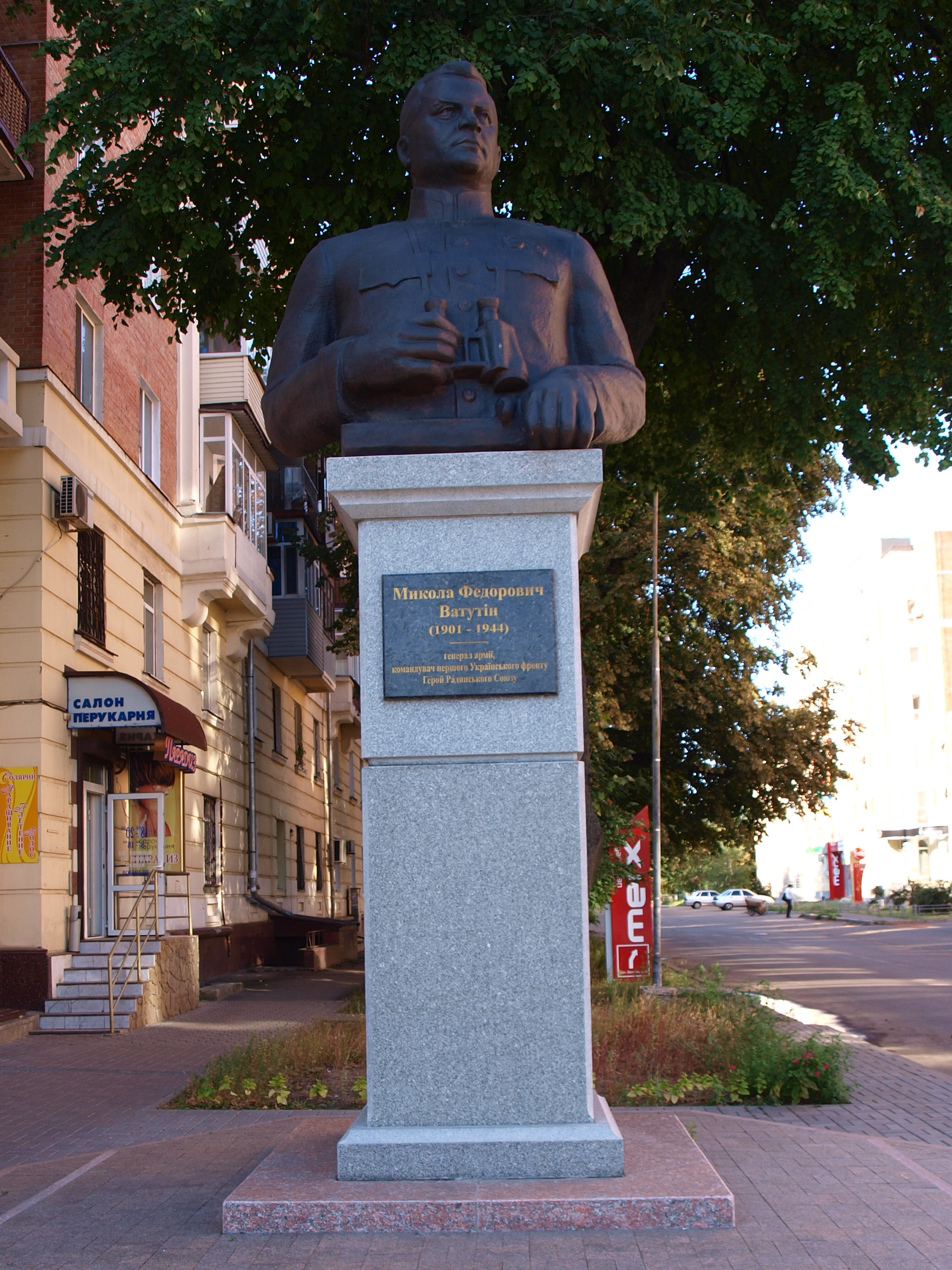 Пам'ятник Ватутіну (Полтава)